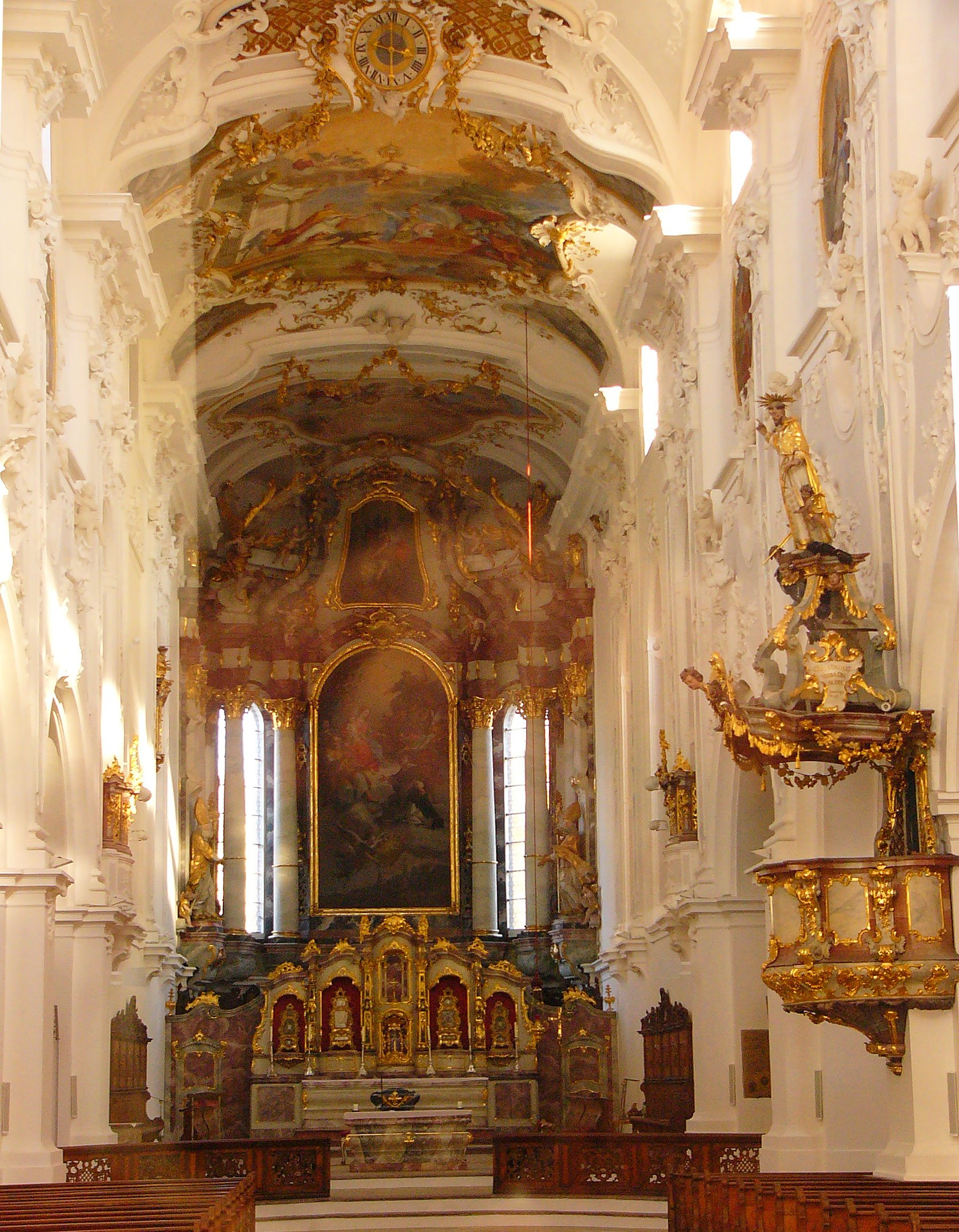 Ehem. Dominikanerklosterkirche, dreischiffige Basilika mit einschiffigem Chor, im Kern frühgotisch, Dachwerk über Chor 1291 (dendro. dat.) und Dachwerk über Hauptschiff des Laienhauses 1340 (dendro. dat.), Umgestaltung des Inneren durch Johann Baptist Zimmermann 1747-1752, Westfassade klassizistisch verändert 1804; mit Ausstattung;This is a photograph of an architectural monument.